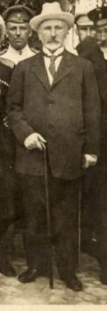 Кривошеин, Александр Васильевич, председатель правительства Юга России, 1920 г.